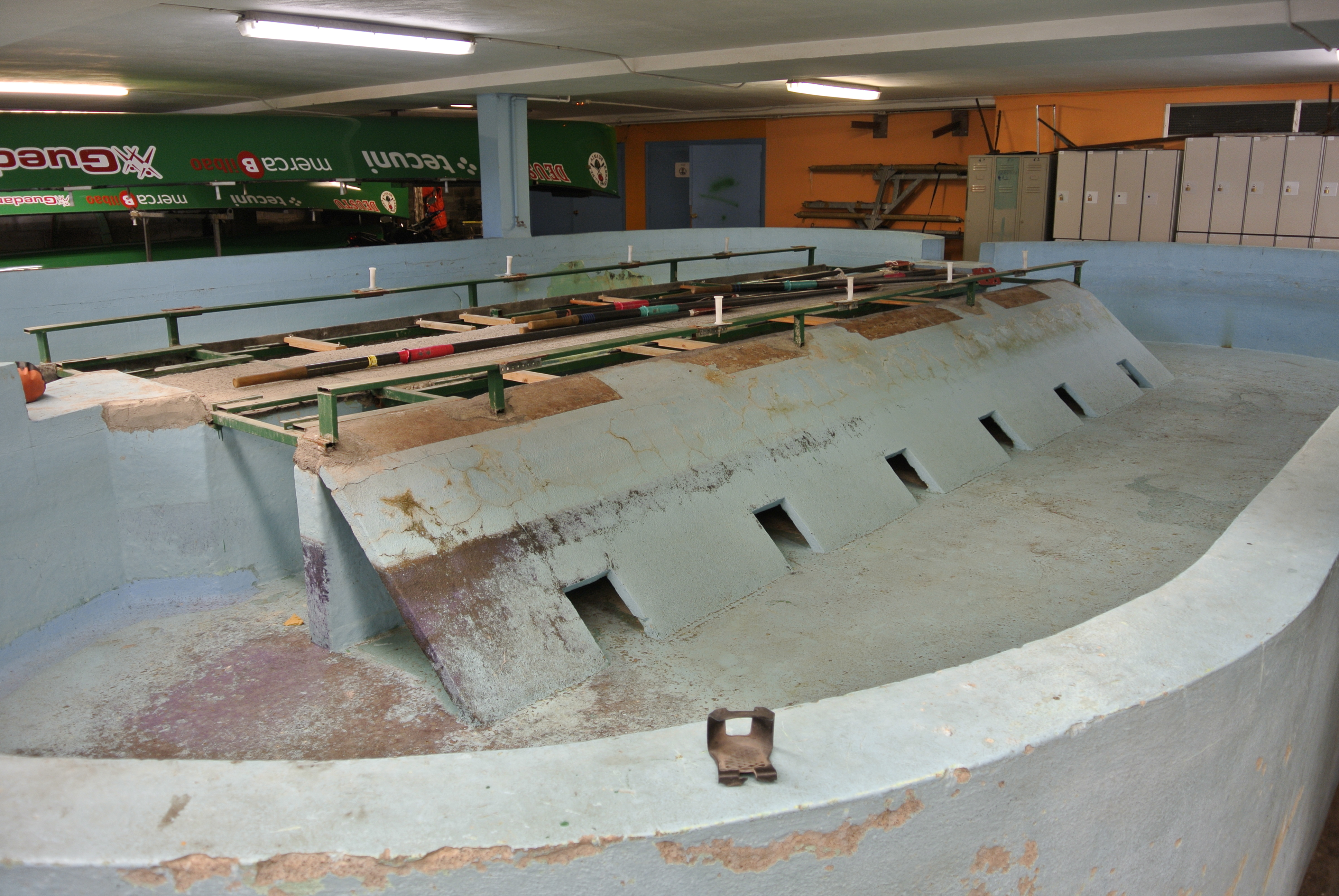 Foso de Deustu Arraun Taldea